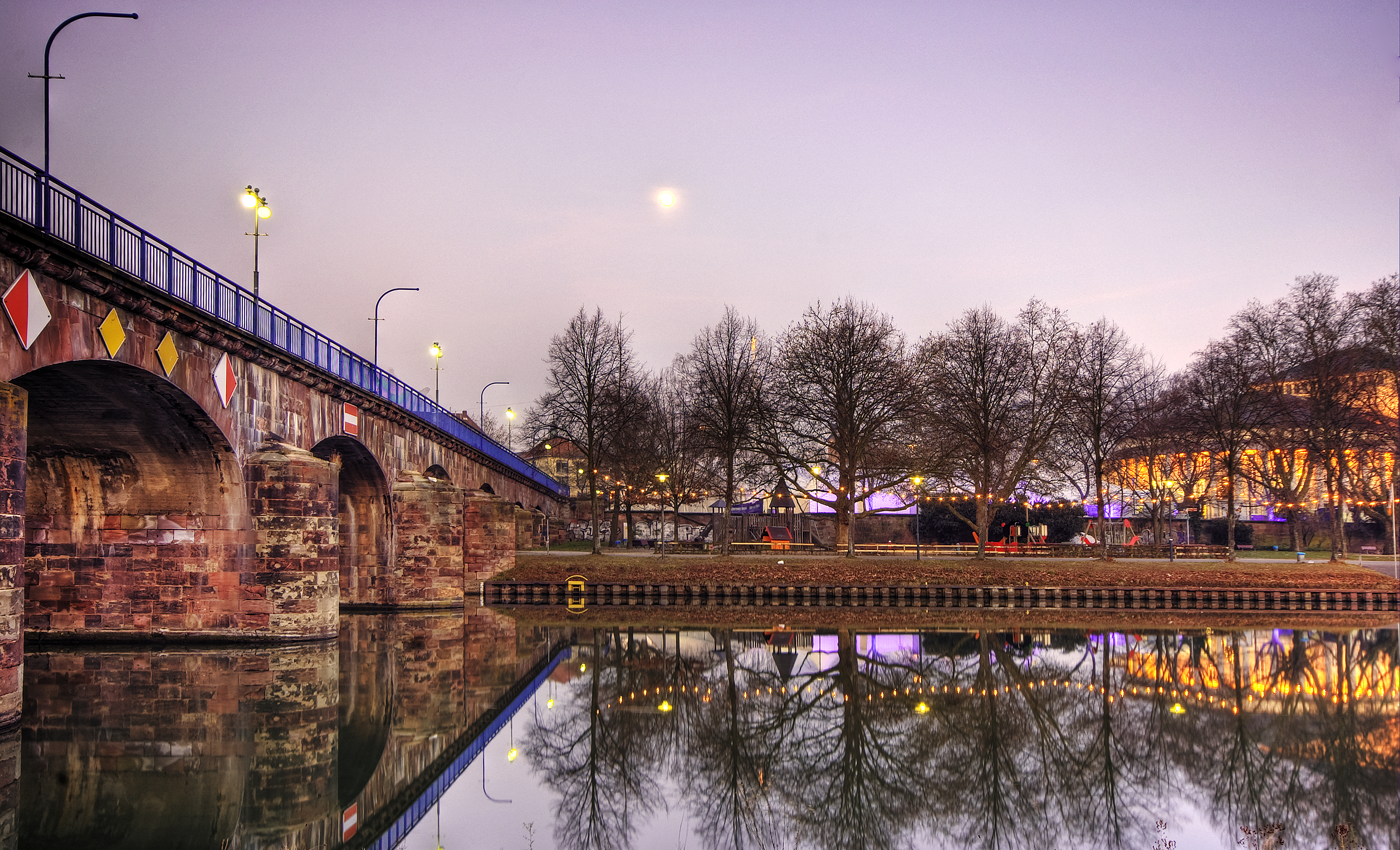 Klick here for a large view! Alte Brücke und Staatstheater, Saarbrücken